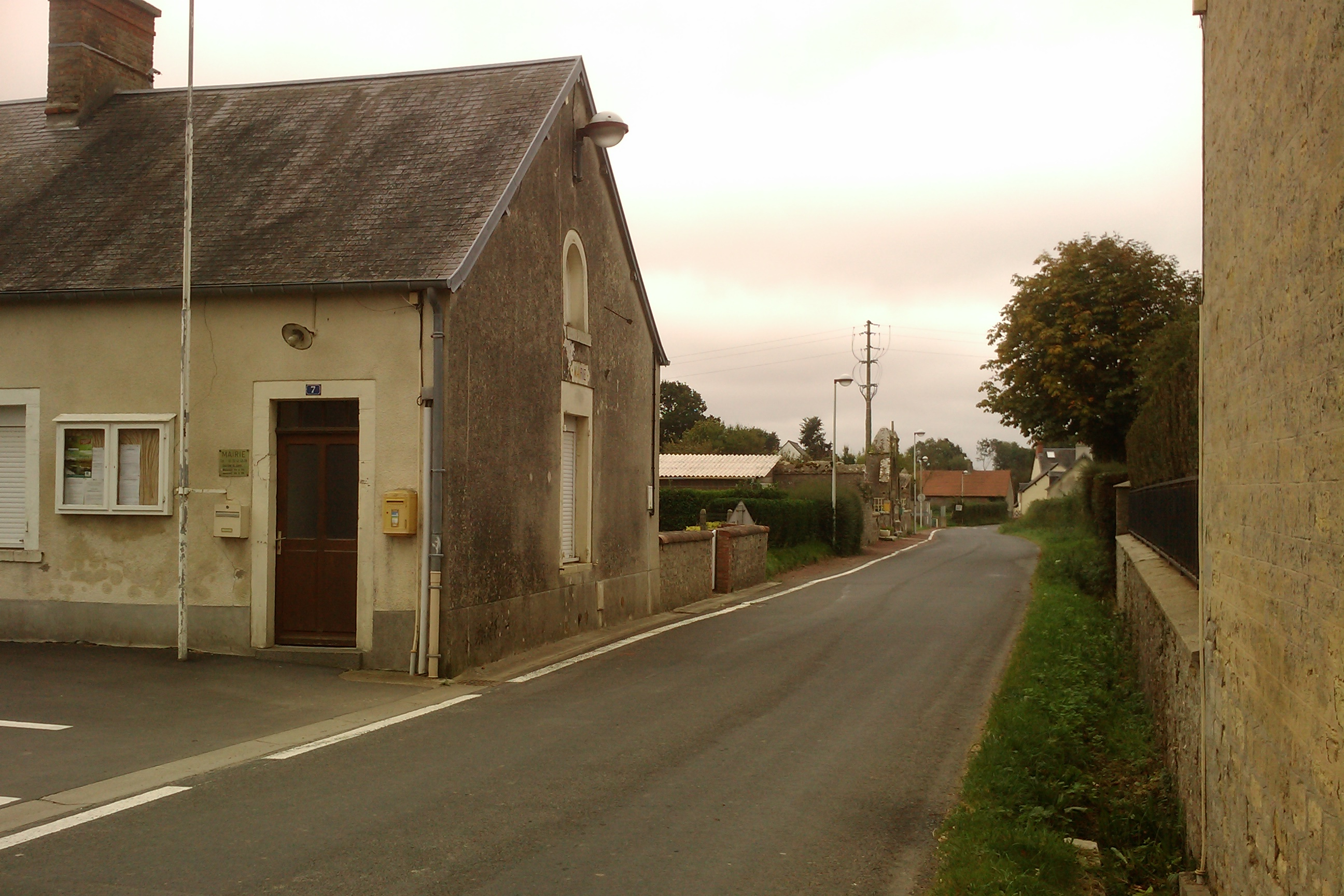 Mairie de Catz sur la D89